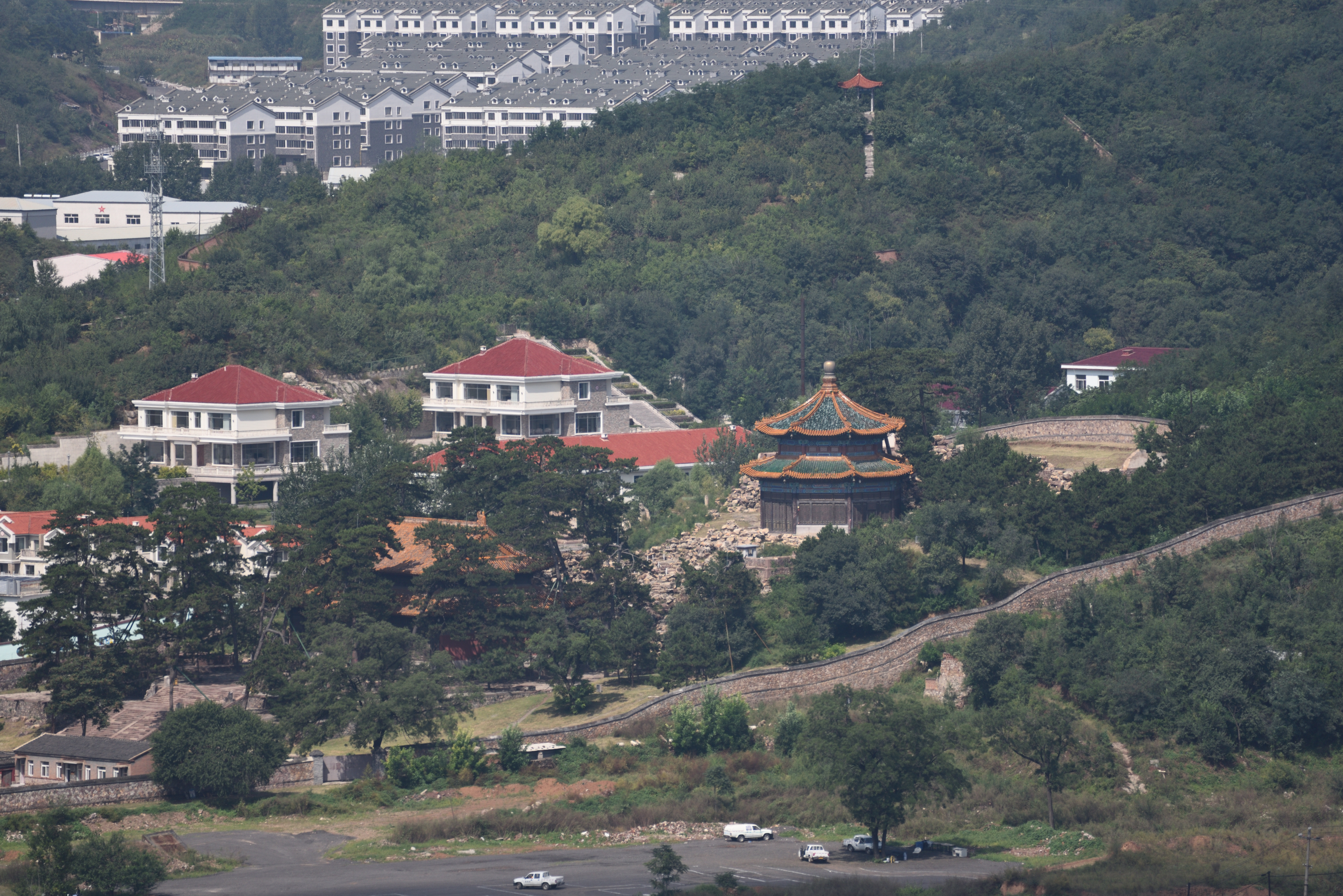 从避暑山庄山峦区看殊像寺